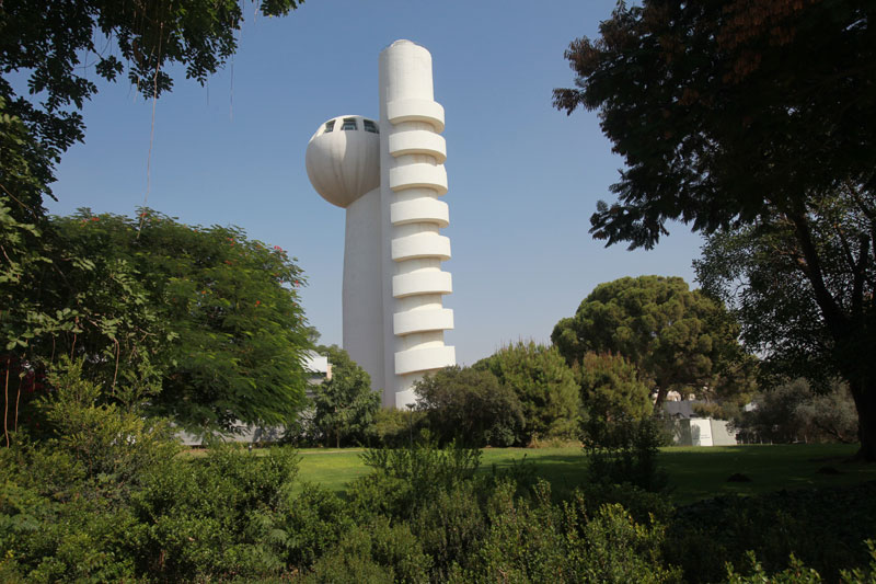 מגדל מייץ